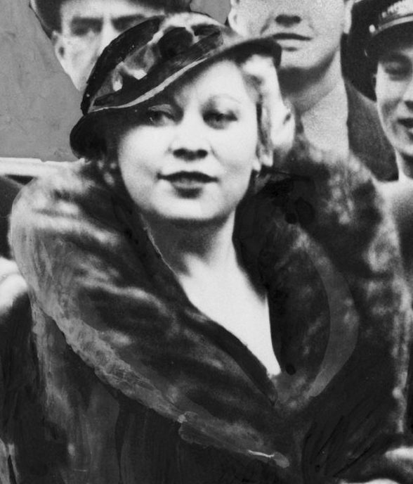 Mae West